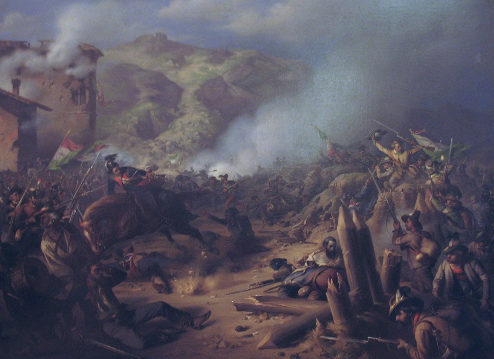 Die Erstürmung des verschanzten Lagers von Lodrone (Judikarien) am 22. Mai 1848label QS:Lde,"Die Erstürmung des verschanzten Lagers von Lodrone (Judikarien) am 22. Mai 1848"